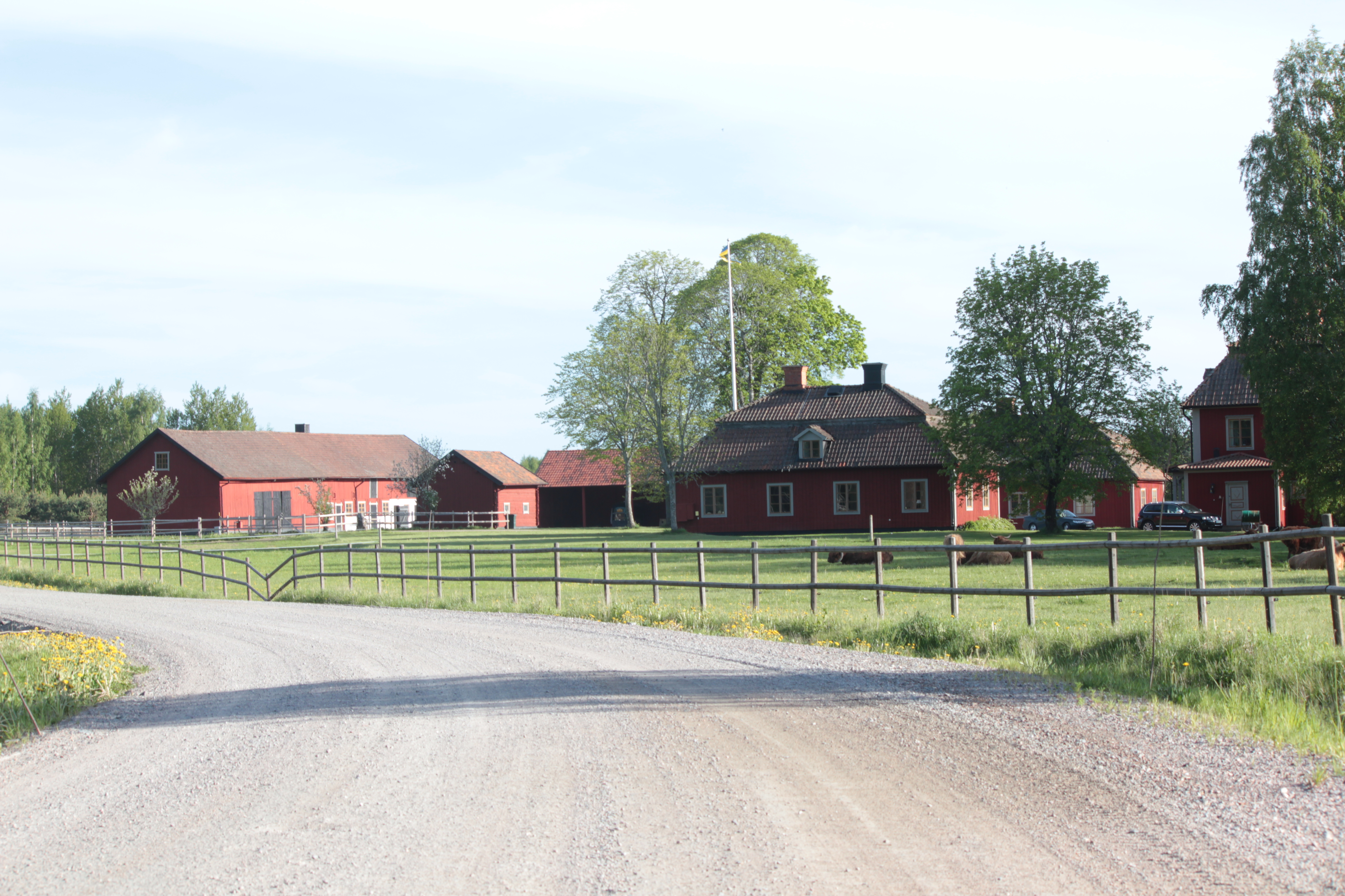 Hadeholm, Gävle kommun. Foto uppladdat som en del i Bergslagssafarin 26 maj 2012.